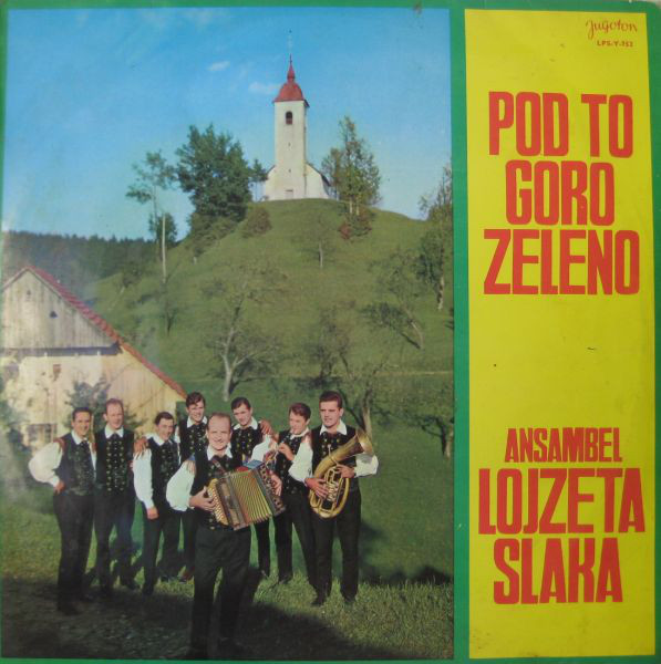 Ansambel Lojzeta Slaka - Pod to goro zeleno.